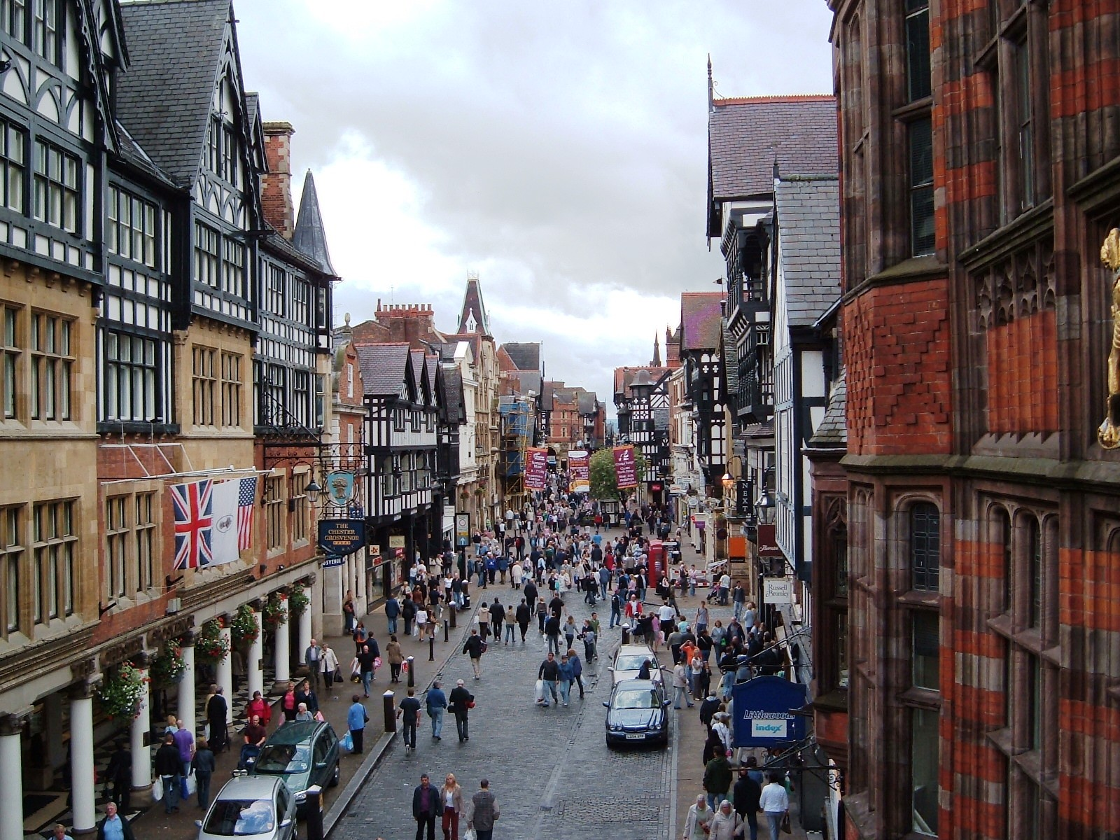 Centro de Chester.